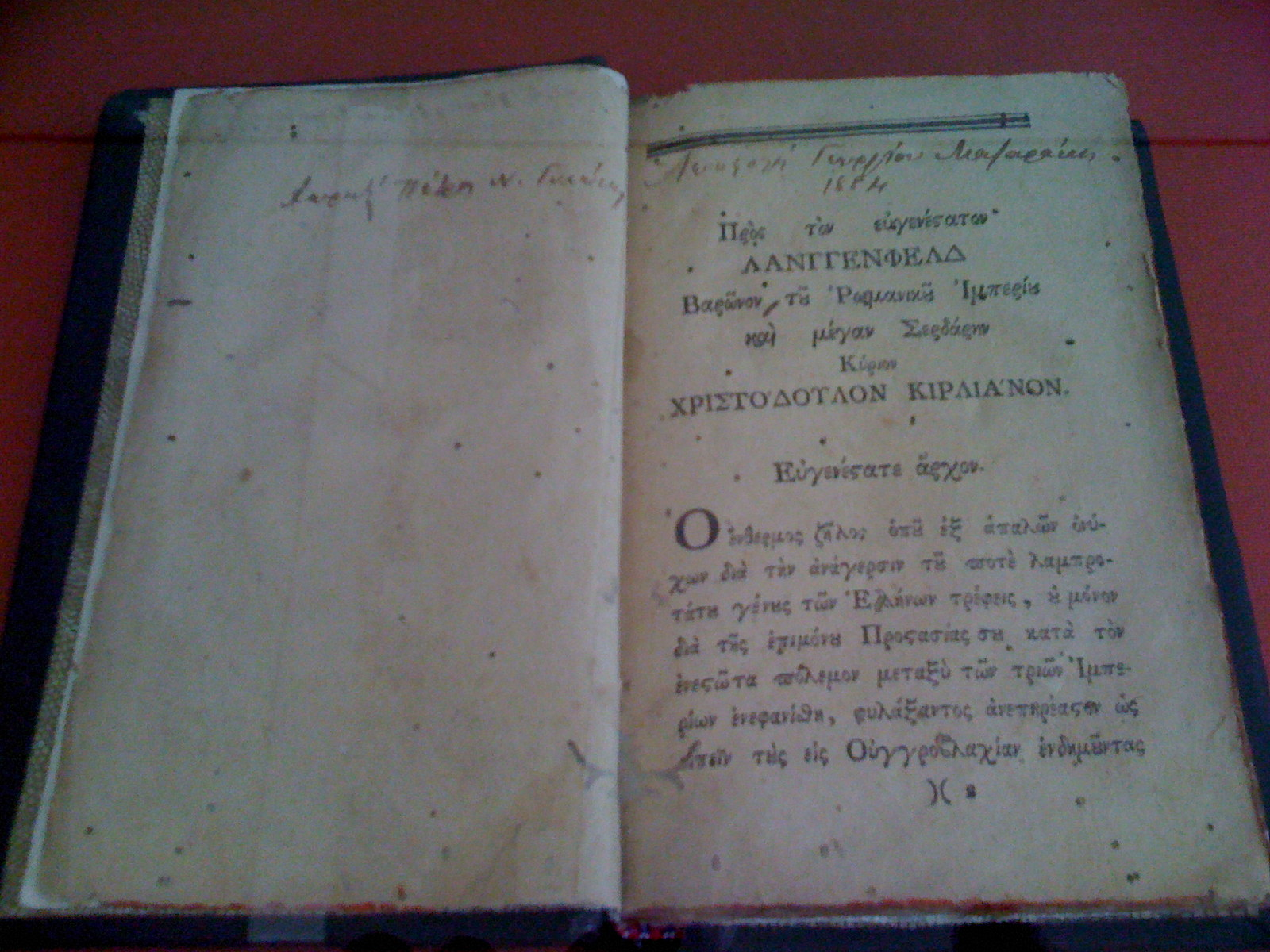 Florilège de physique par Rigas (1757?-1798) Édité à Vienne (Autriche) en 1790 Pièce du Musée national historique de Grèce exposée à l'Institut et musée Voltaire de Genève (Suisse)